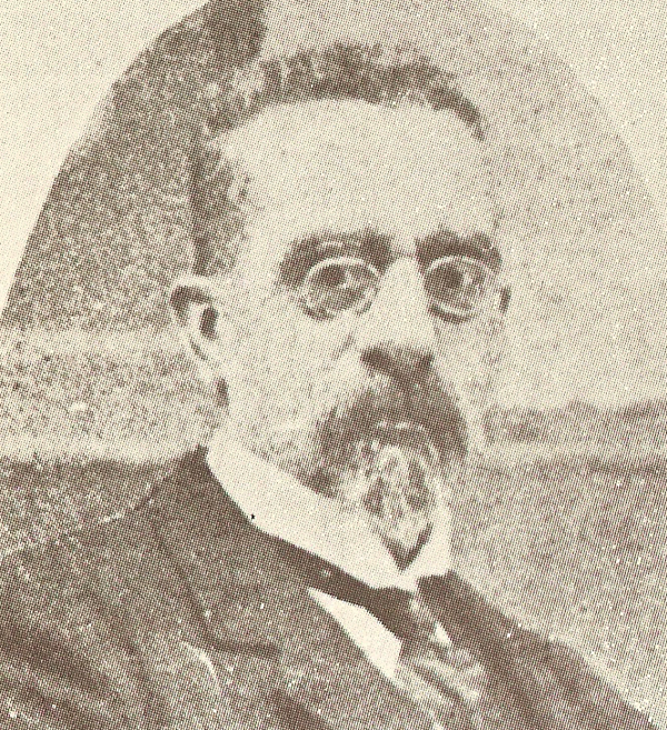 Victorino Abente y Lago (Q11705076)